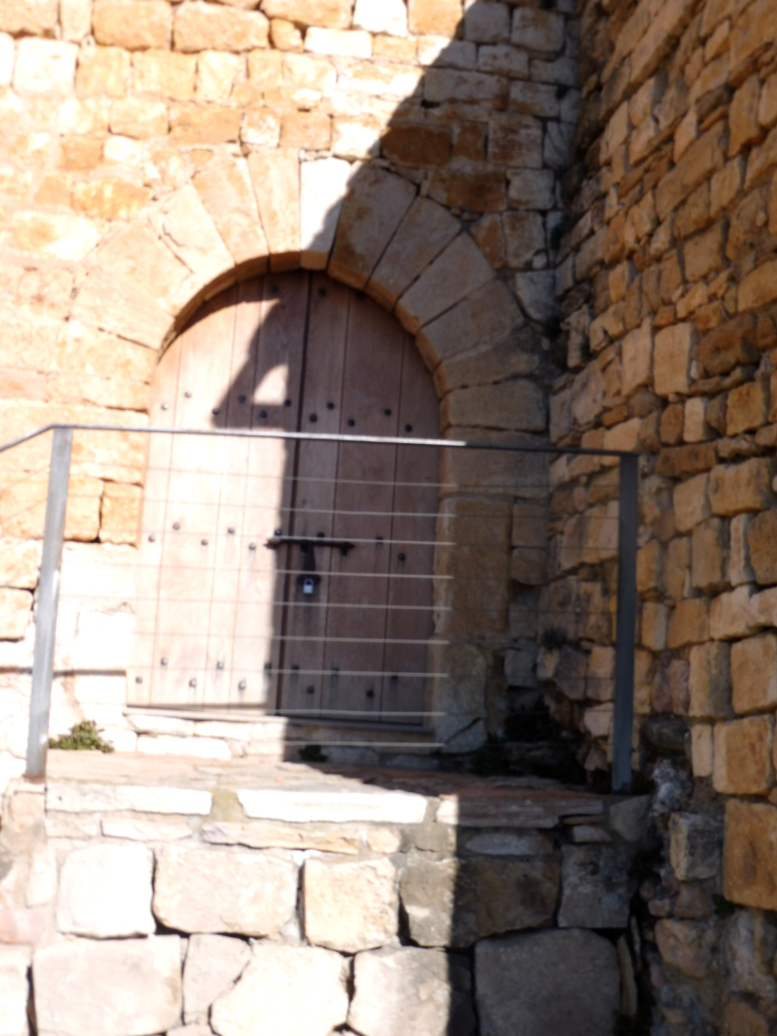 Església de Sant Miquel de Tartareu (les Avellanes i Santa Linya): portada